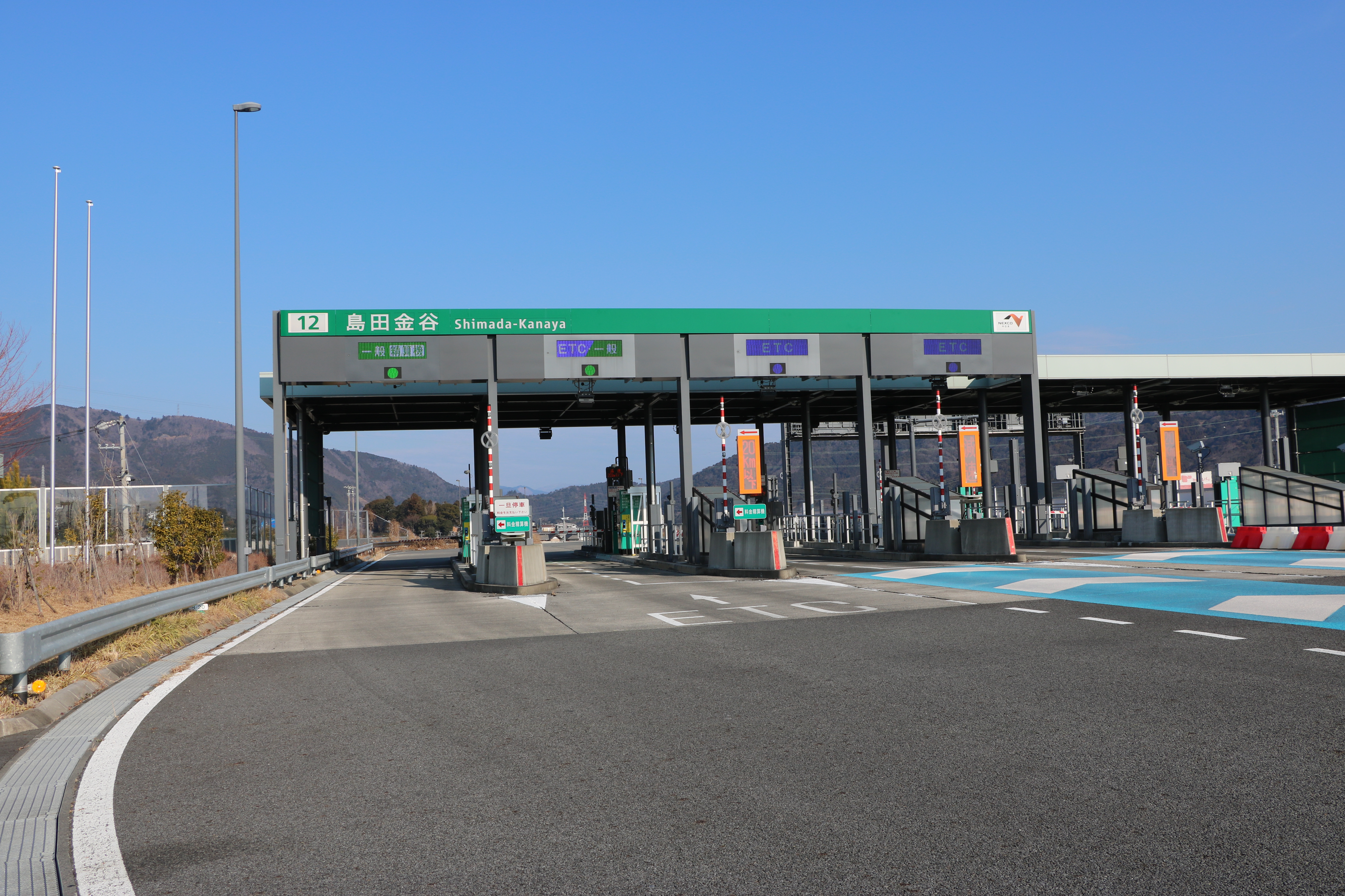 新東名高速道路。島田金谷インターチェンジ料金所。（静岡県島田市）